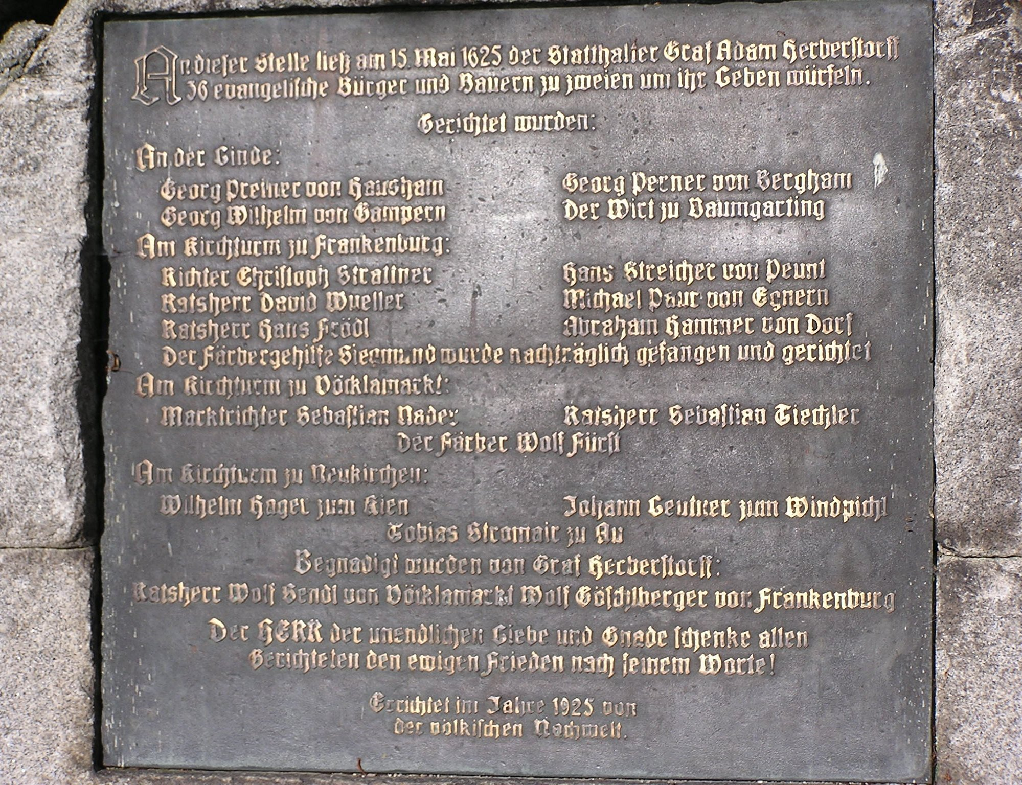 Gedenkstein am Schauplatz des Frankenburger Würfelspiels